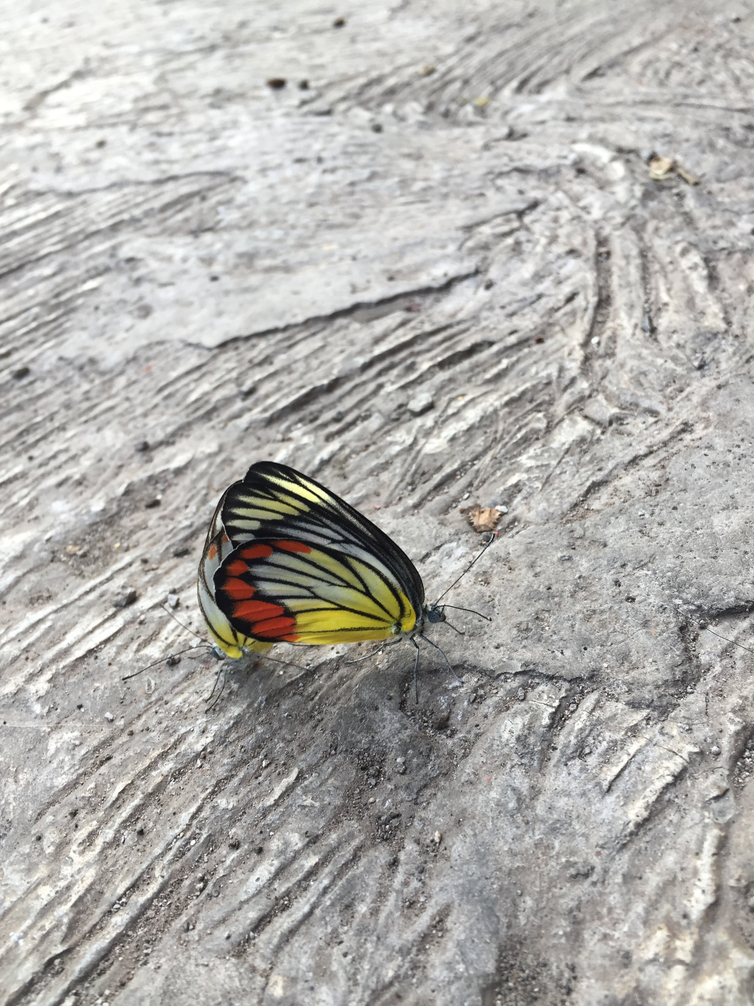 Perkawinan Kupu-Kupu (Kupu-Kupu Common Jezebel atau Delias eucharis)